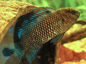 Kéksügér (Badis badis)